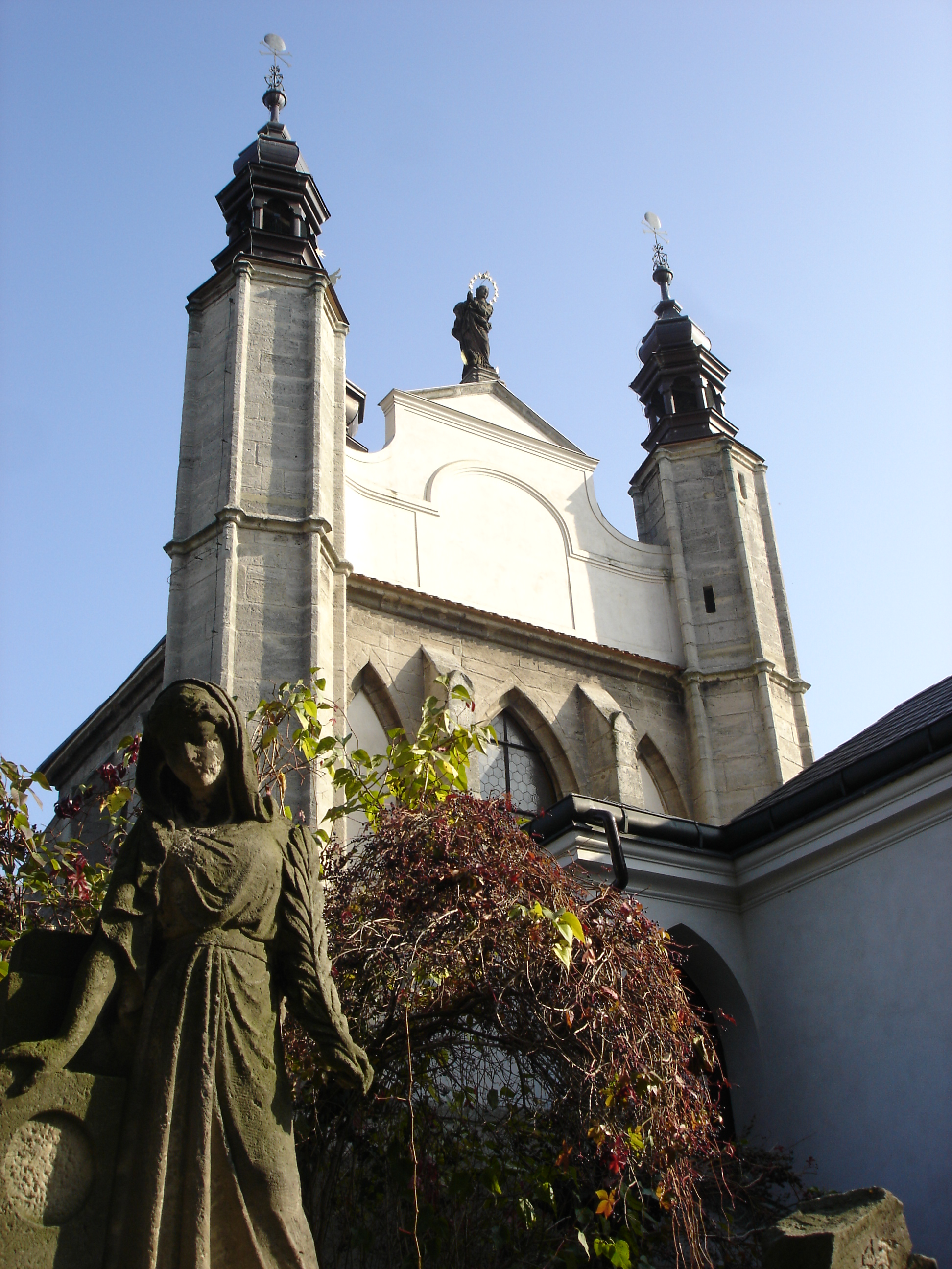 Allerheiligenkirche mit Figur eines Grabsteines auf dem Friedhof vom Sedletz-Ossarium